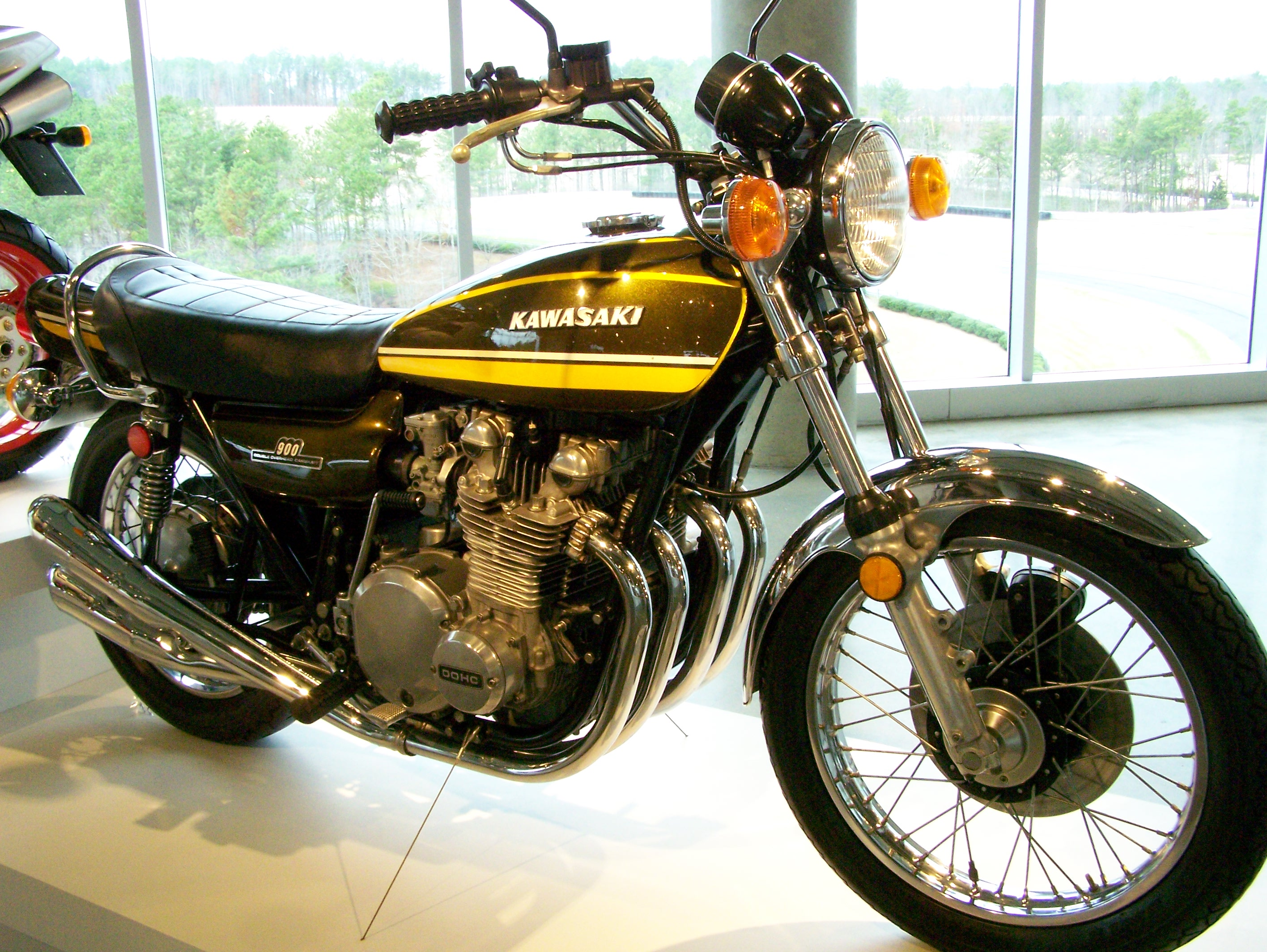 Barber Vintage Museum_121 1974 Kawasaki 900 Z1 More Description is here